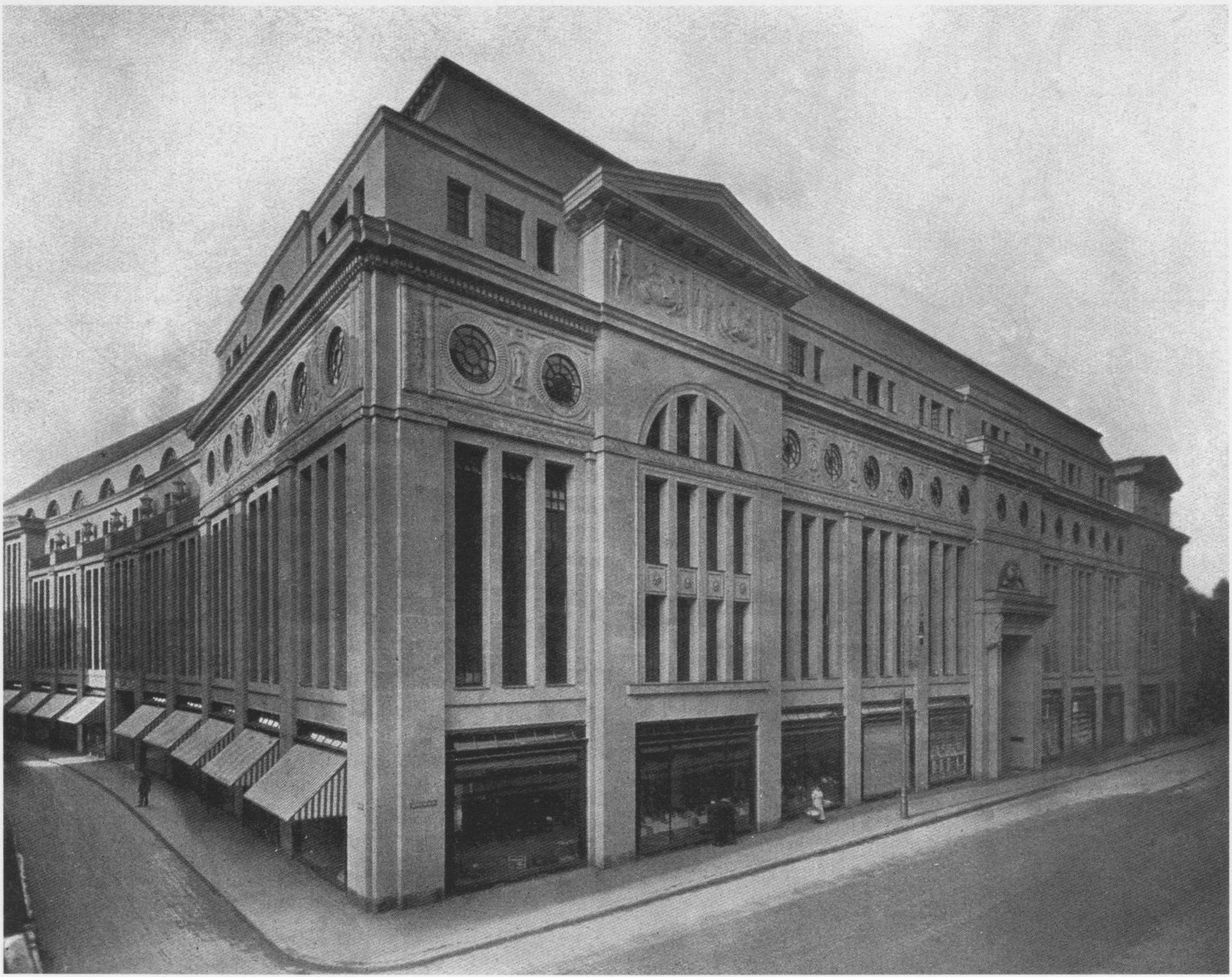 Warenhaus Tietz, Köln. Plastischer Schmuck der Fassade ist vom Bildhauer Johannes Knubel